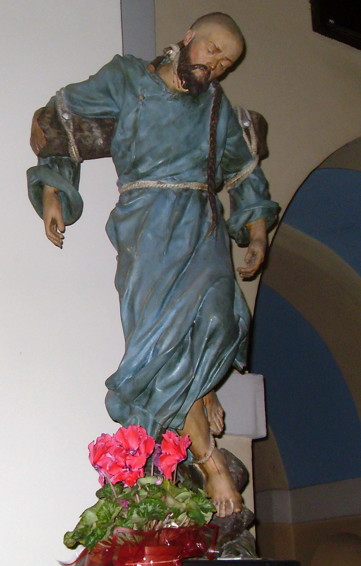 Pomnik Jean-Gabriel Perboyre z krakowskiego kość. ss. karmelitanek przy ul. Kopernika.